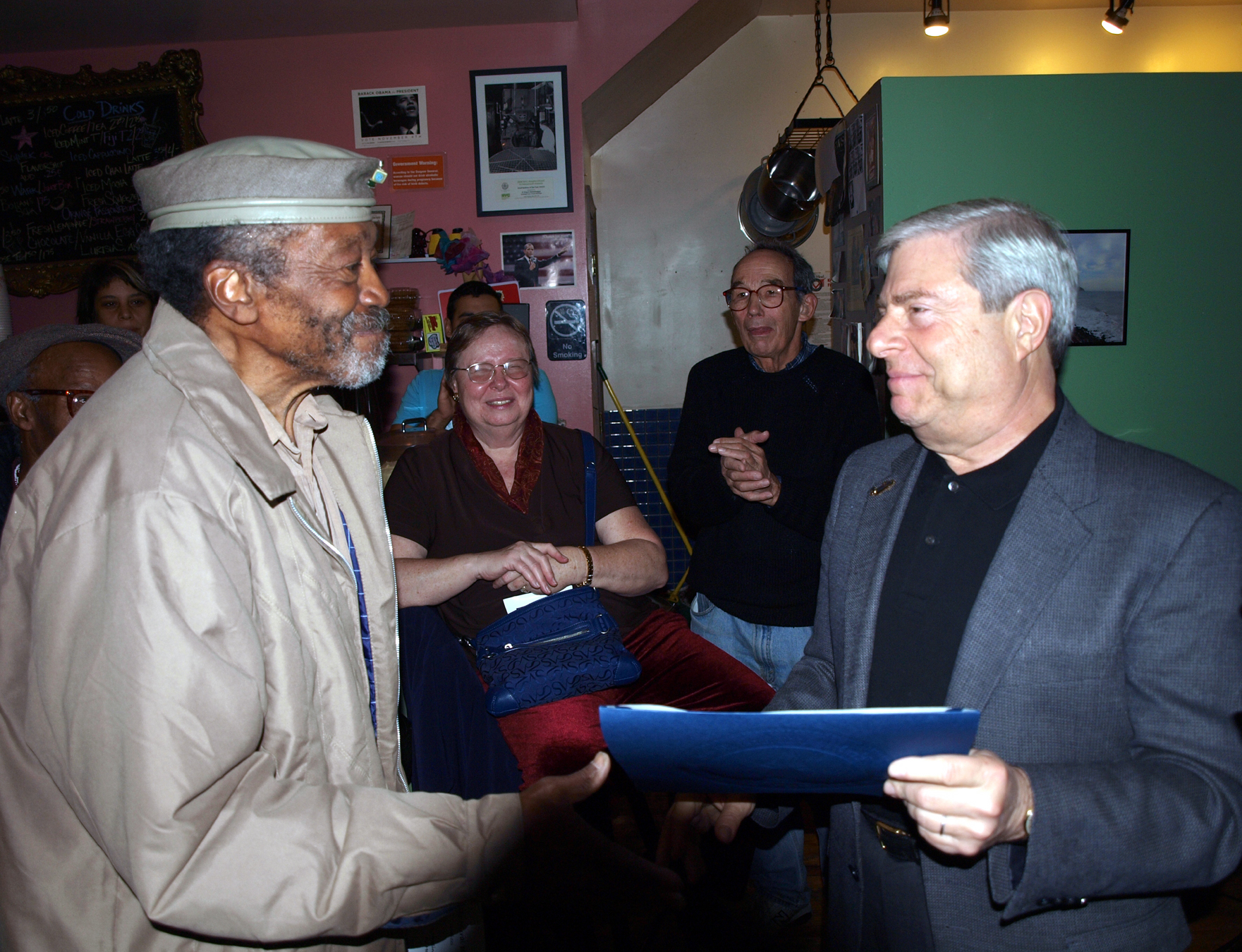 PLG Arts Mural project